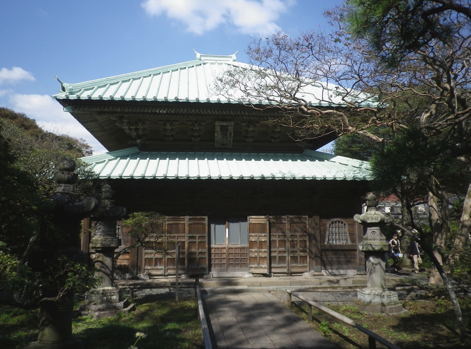 英勝寺本殿